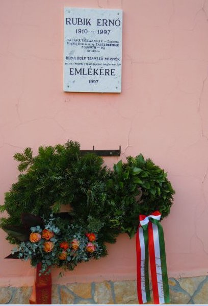 Rubik Ernő emléktábla a régi gyár falán Esztergom, Imaház u. 2/a (volt Technika Háza)